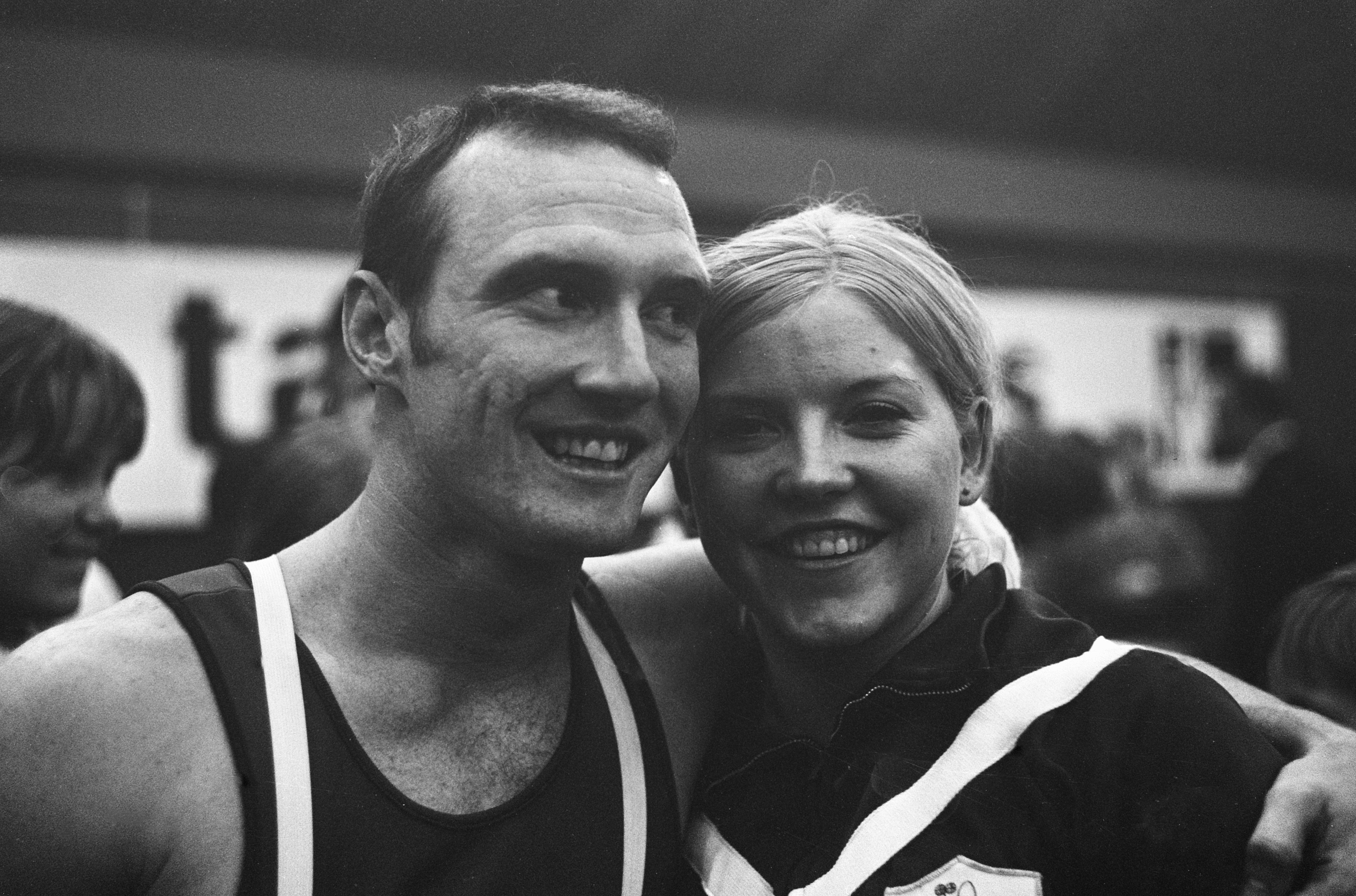 Collectie / Archief : Fotocollectie Anefo Reportage / Serie : [ onbekend ] Beschrijving : Wereldkampioenschappen trampoline-springen te Amersfoort Judy Wills en David Jacobs , koppen Datum : 30 november 1968 Trefwoorden : trampolinespringen, wereldkampioenschappen Fotograaf : Koch, Eric / Anefo Auteursrechthebbende : Nationaal Archief Materiaalsoort : Negatief (zwart/wit) Nummer archiefinventaris : bekijk toegang 2.24.01.05 Bestanddeelnummer : 921-9036